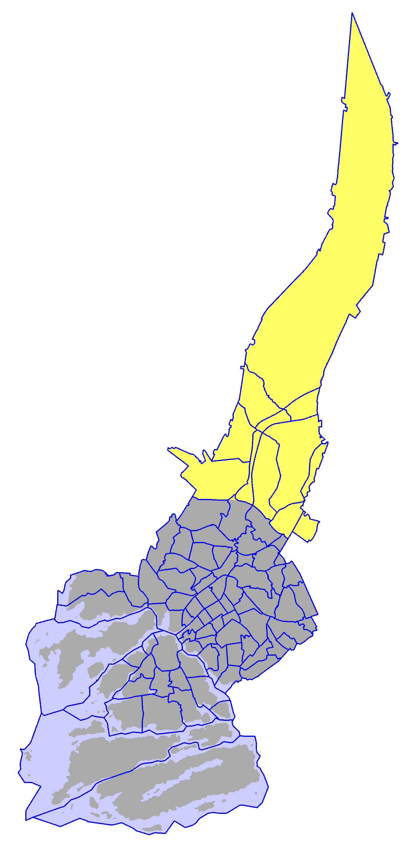 Ward of Maaria-Paattinen, in Turku